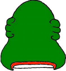 Glifo o escudo de armas de Emiliano Zapata